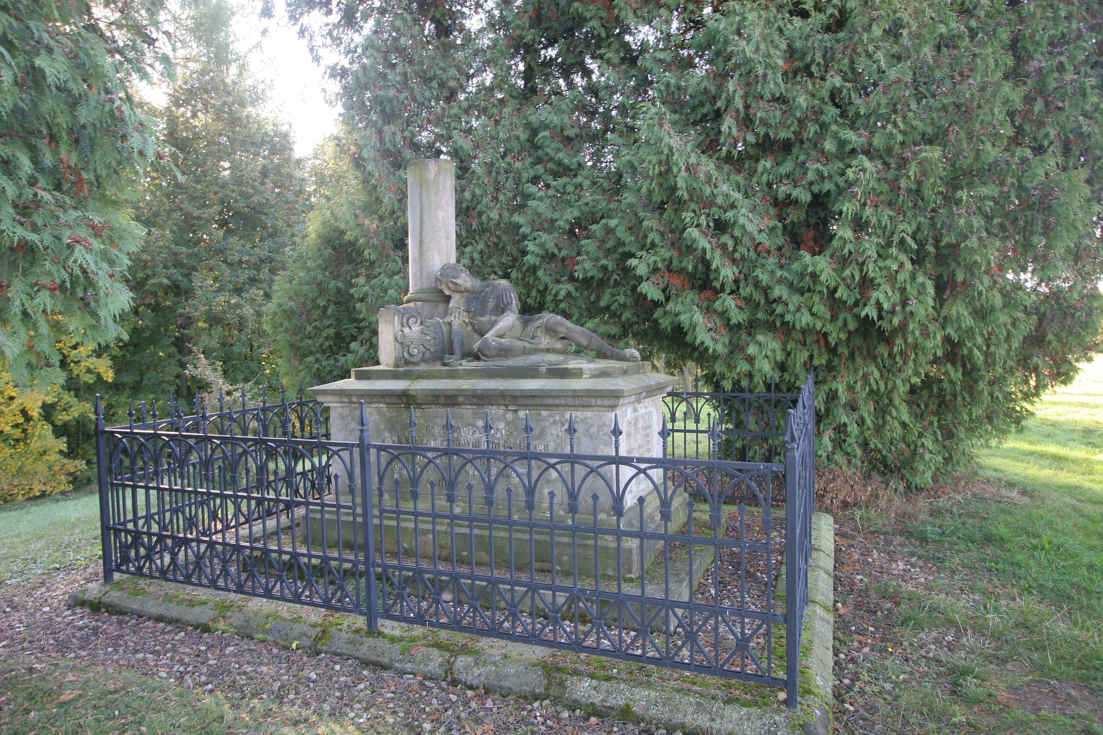 Pomník z války 1866 rakouskému c. k. pěšímu pluku č. 12 (Máslojedy), při polní cestě do Benátek, Máslojedy